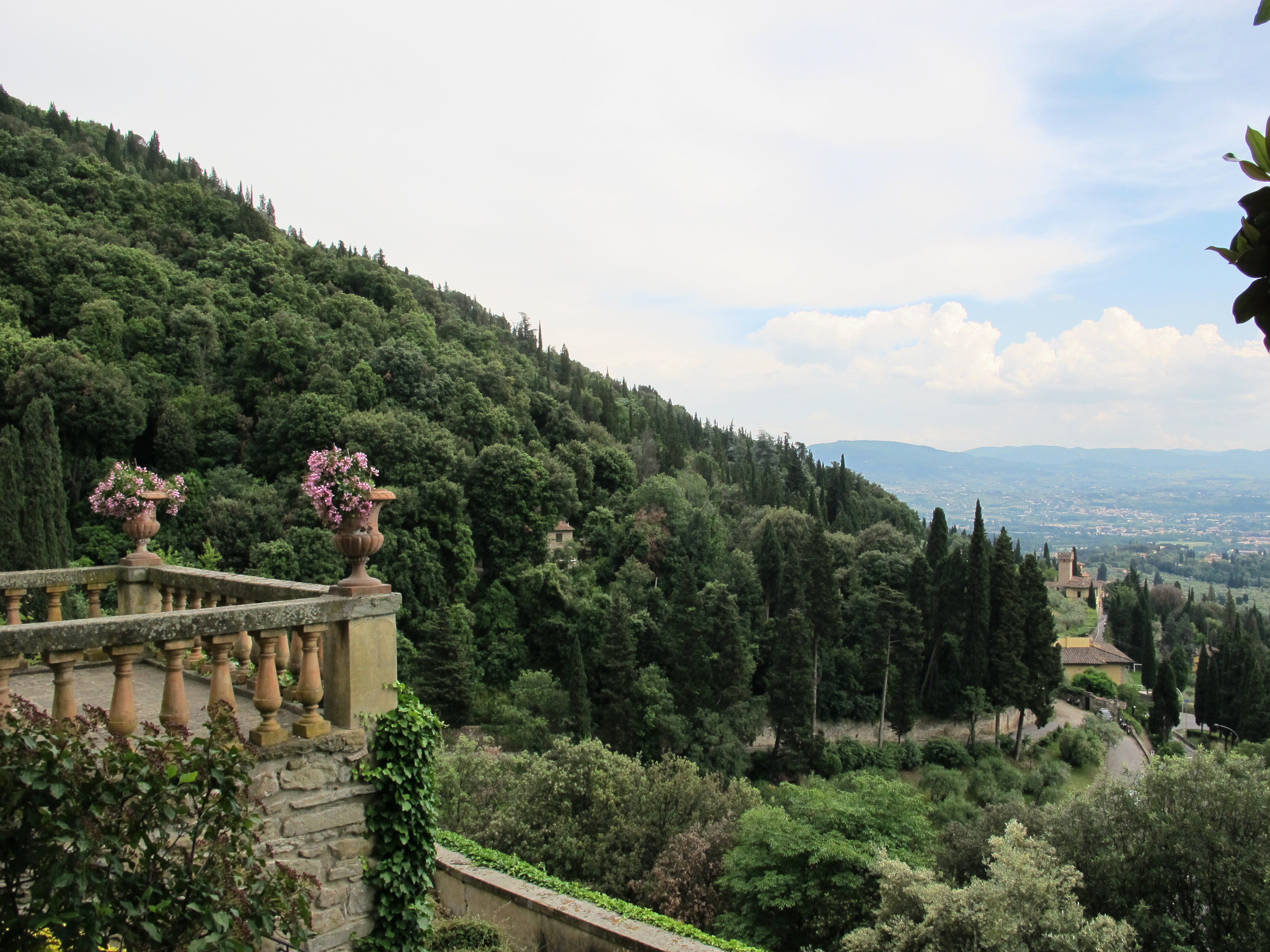 Villa san michele, giardino ovest 08 terrazza